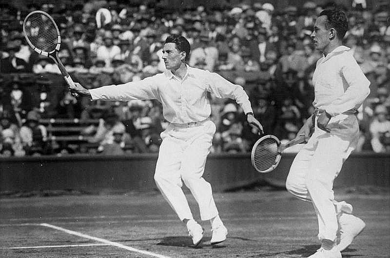 Frankreichs Verteidigung des Davis-Pokals ! Eine Wimbledon-Aufnahme der französischen Vertreter Brudnon (links) und Cochet (rechts). Brudnon in erhöhter Aktion beim Kampf gegen Amerikaner Tilden-Lott.